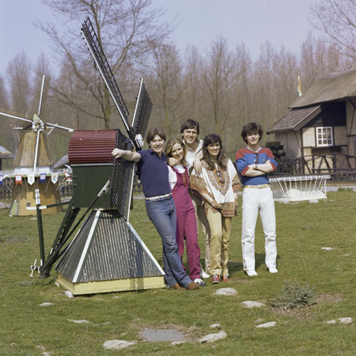 De Oostenrijkse groep Blue Danube tijdens een fotosessie voor het Eurovisie Songfestival 1980